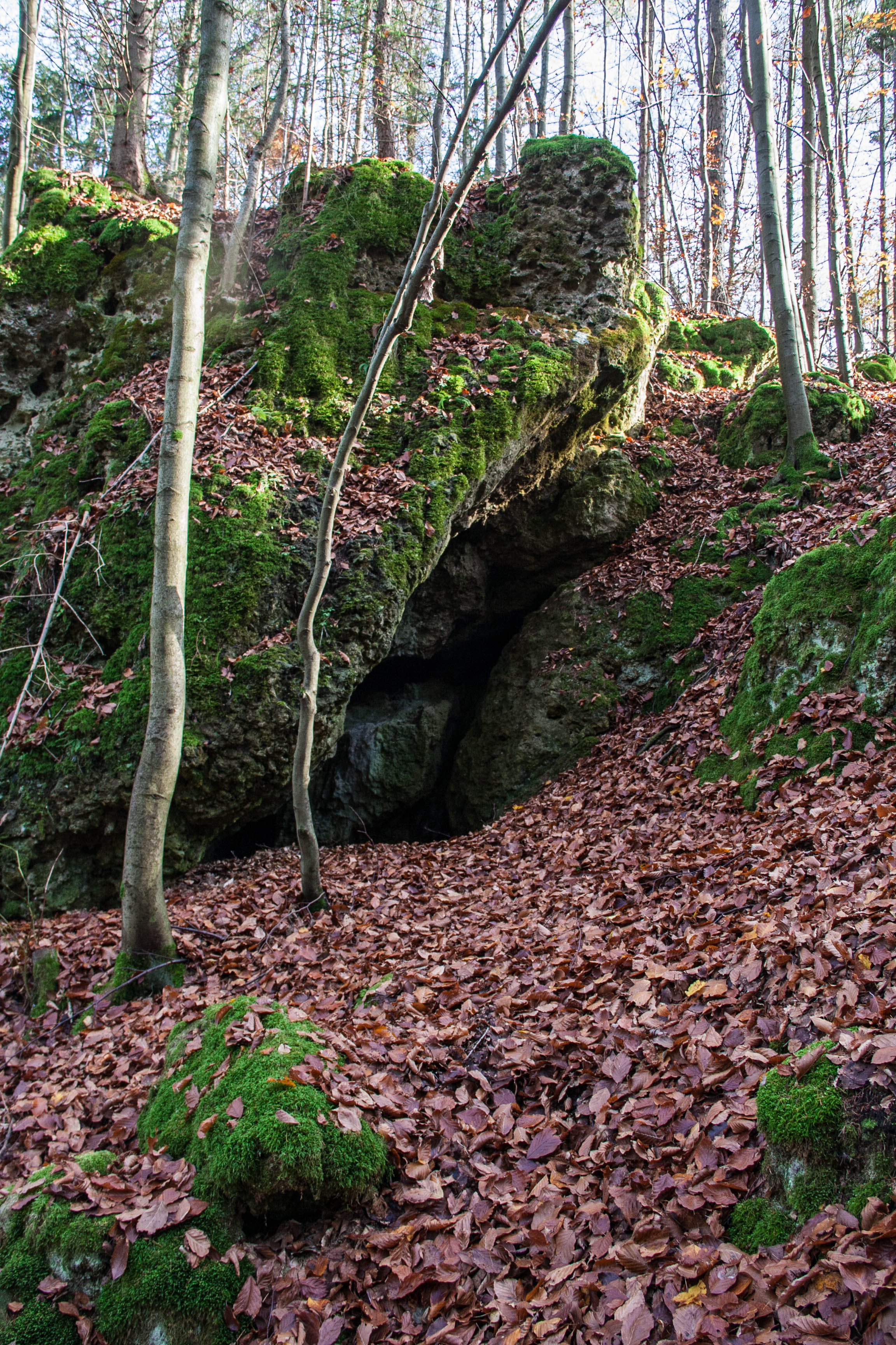 Anton-Völkel-Grotte, A 33, Höhle, Königstein